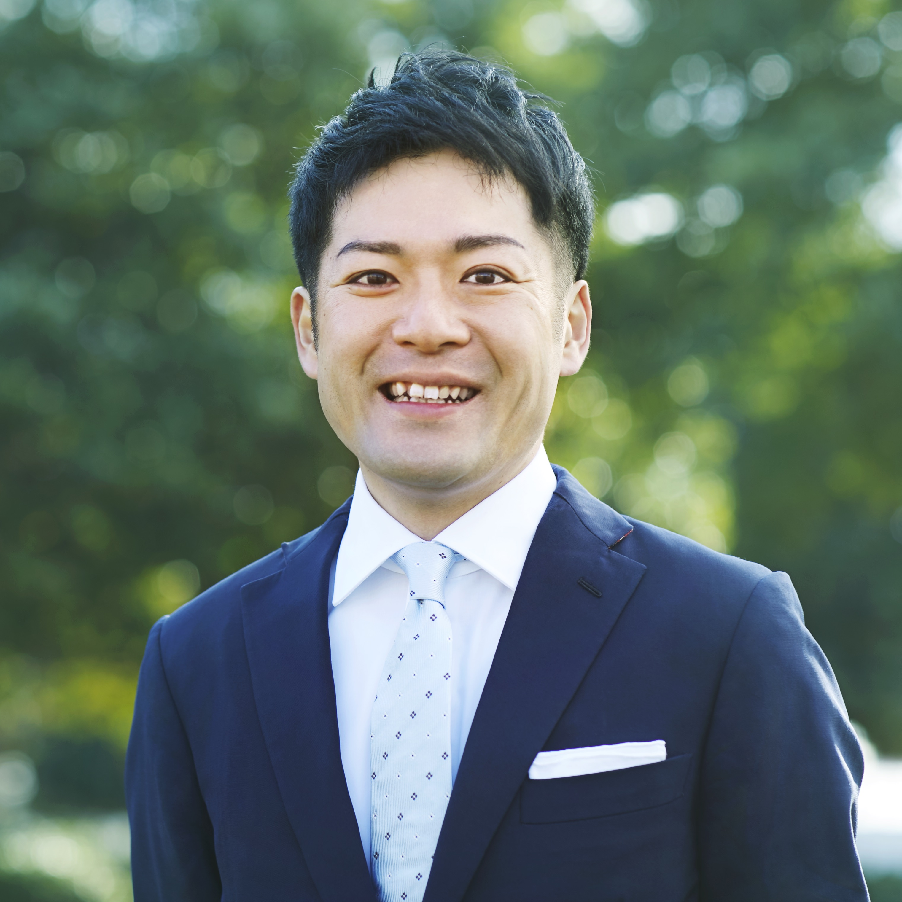 横尾俊成のプロフィール写真